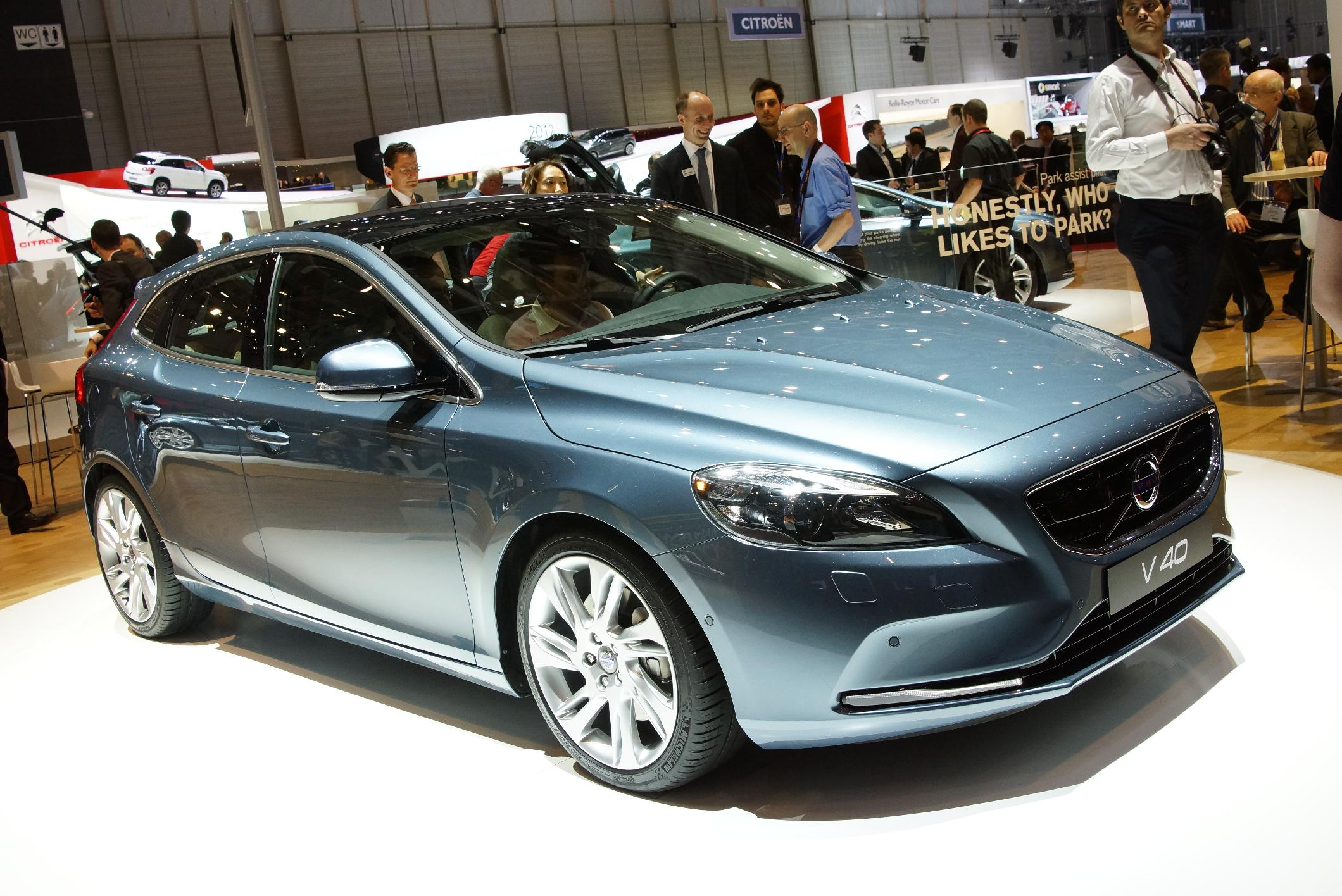 La Volvo V40 presentata al salone dell'auto di Ginevra nel 2012